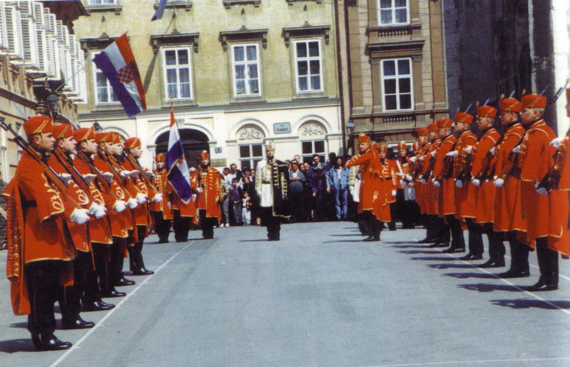 Velika smjena straže ispred Banskih dvora, Zagreb, Hrvatska